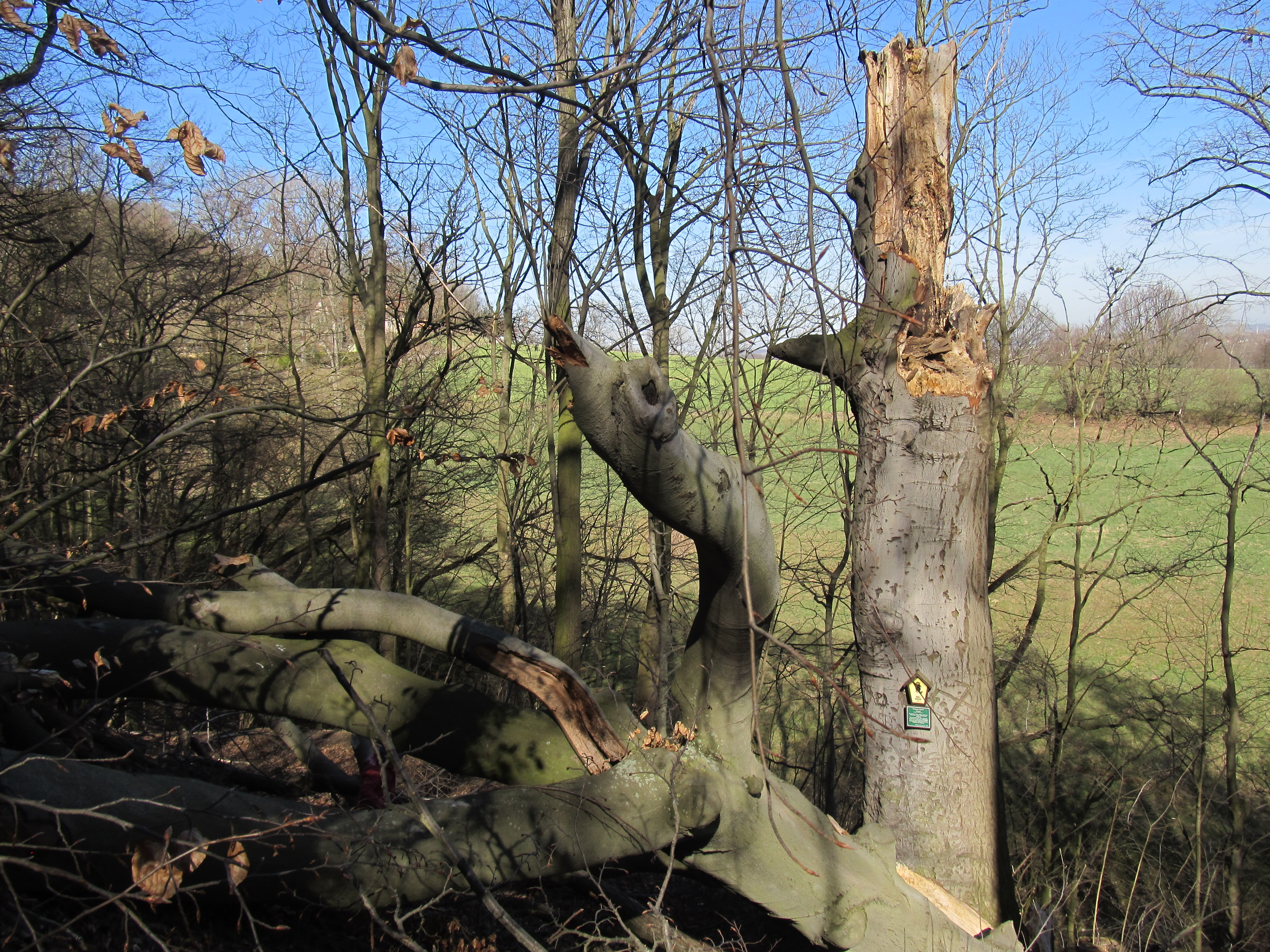 Naturdenkmal Politische Buche im Kleditschgrund, Dresden, im April 2018 (nach Kronenbruch im Herbst 2017)